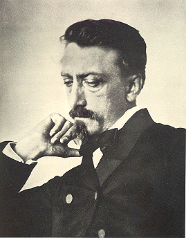 Foto van Multatuli, door H.C. Overman/Koene & Büttinghausen. Oktober 1853.